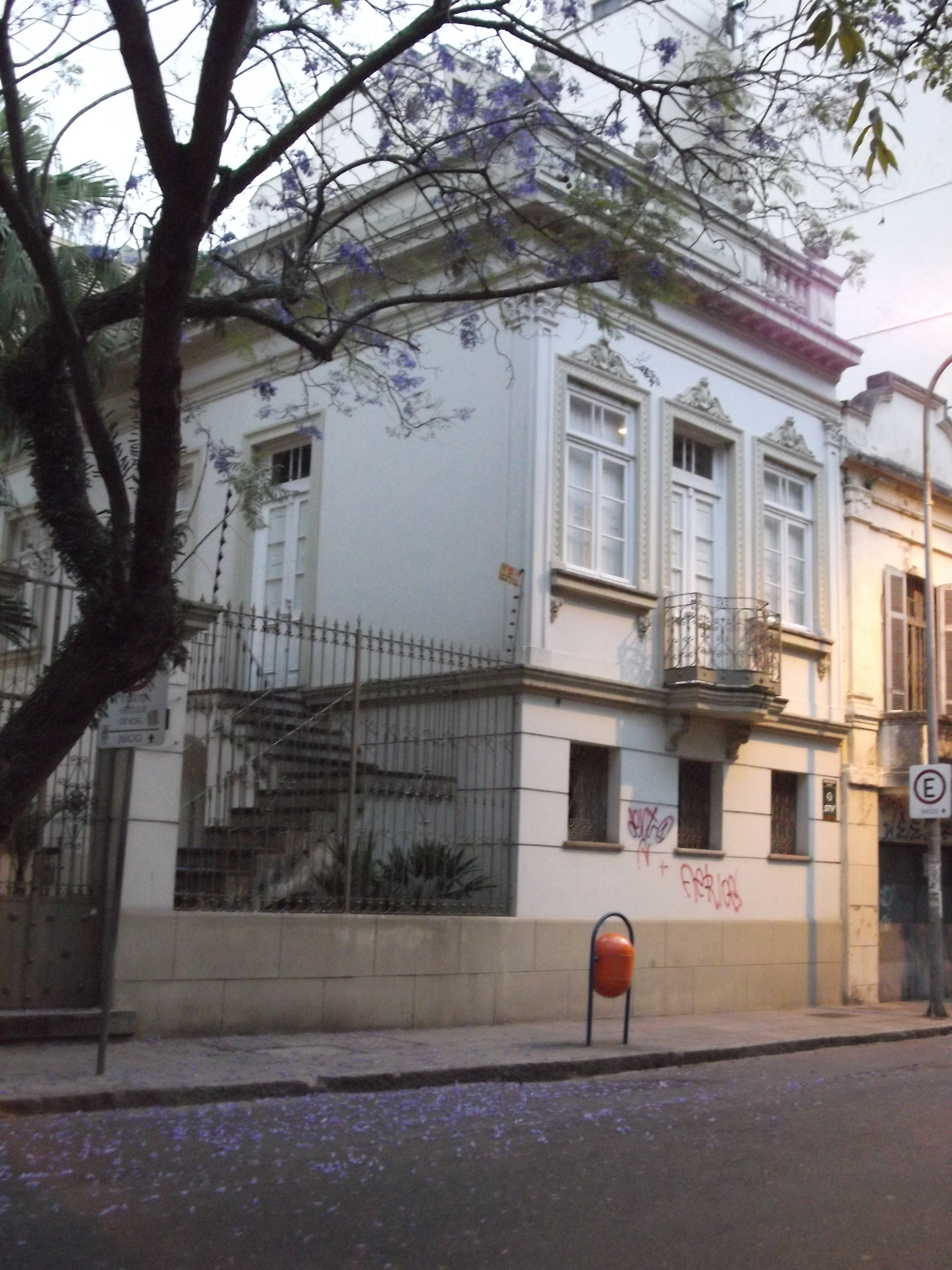 Rua Riachuelo, 525 - Porto Alegre - Brasil